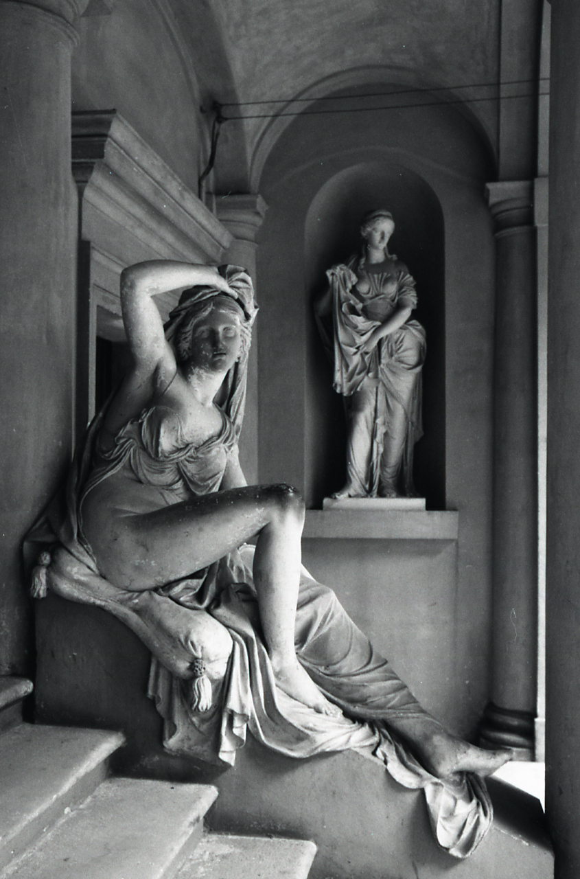 Servizio fotografico : Bologna, 1969 / Paolo Monti. - Strisce: 7, Fotogrammi complessivi: 37 : Negativo b/n, gelatina bromuro d'argento/ pellicola ; 35 mm. - ((I fotogrammi hanno una doppia numerazione. . - Sul portanegativi: Nikon Agfa 21. - Occasione: Campagna di rilevamento del centro storico del comune di Bologna. - , presso Archivio Paolo Monti. - Fonte: Fattura di Paolo Monti: IV. Commesse/ Fattura (1969/07/31), presso Archivio Paolo Monti. - Fonte: Agenda di Paolo Monti: Monti - Agenda 1969 (1969), presso Archivio Paolo Monti. - Fonte: Fattura di Paolo Monti: IV. Commesse/ Fattura (1969/05/09)